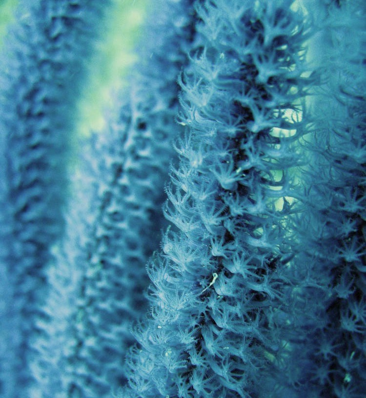 Vista de pólipos de Junceella sp, Koh Phangan, Tailandia